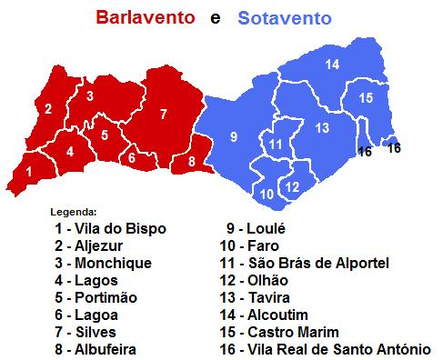 Mapa colorido da divisão entre as regiões do Barlavaento e Sotavento, no Algarve.